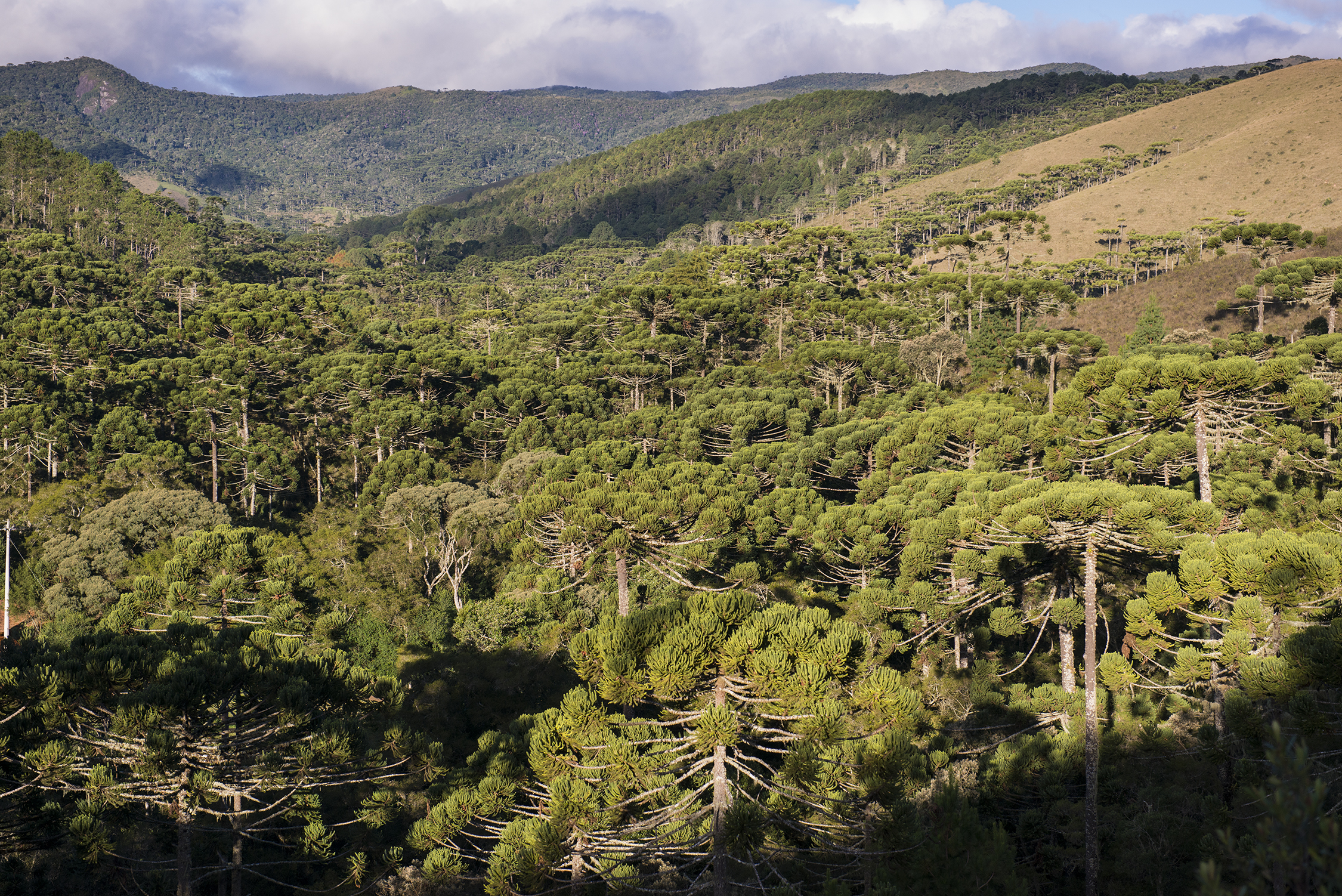 Araucárias, conhecidas também como Pinheiro do Paraná; Árvore típica da região Sul e em algumas partes do Sudeste Brasileiro